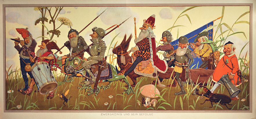 “Zwergkönig und sein Gefolge”. Farblithographie auf Papier in Kartonstärke, um 1915, Darstellung : 47 × 107,5 cm. Druck u. Verlag der Graph. Kunst-Anst. v. Hubert Köhler, München.